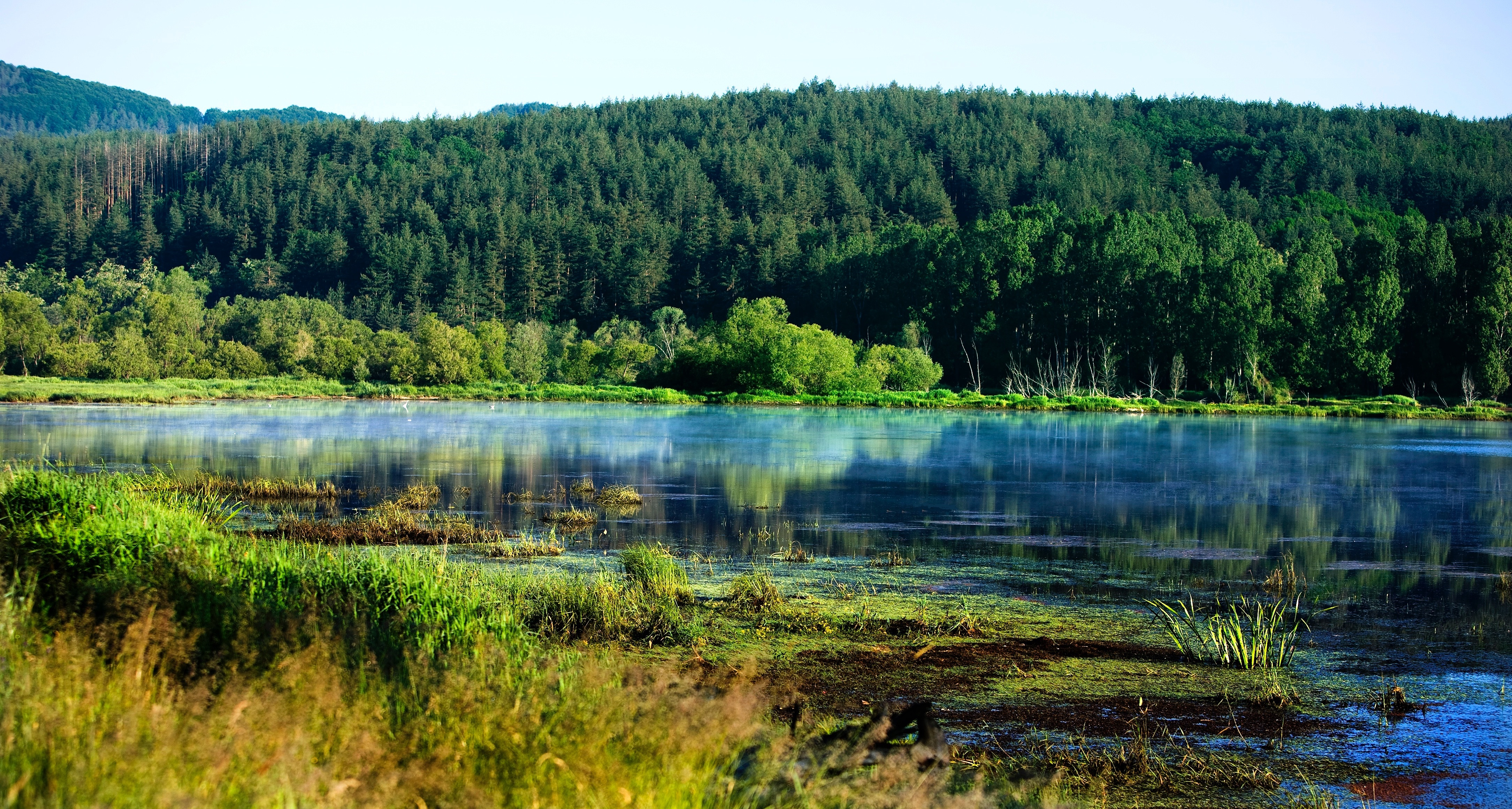 Резерват "Шаварите"